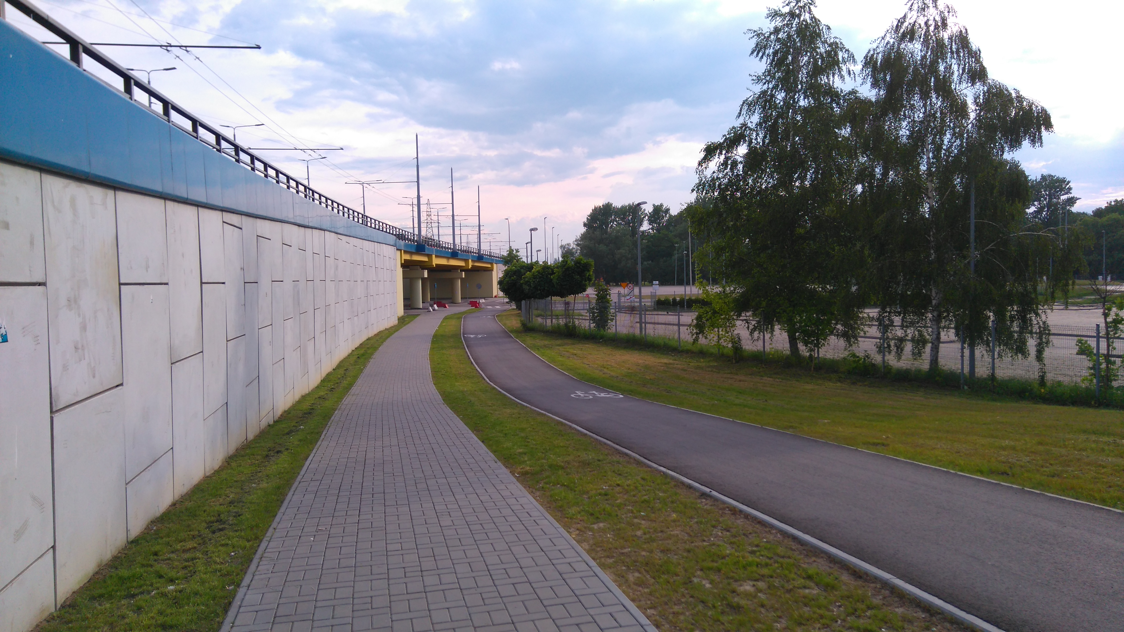 Ścieżka rowerowa i chodnik przy nowym wiadukcie przy ulicy Ulica Lubelskiego Lipca 80 w Lublinie.